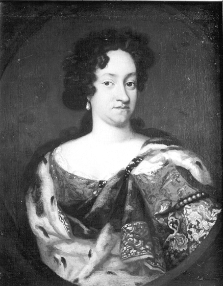 Anna Sophia Kurfürstin von Sachen, Mutter August des Starken, Gemahlin Johann Georgs III., Tochter des Dänenkönigs Friedrich III.